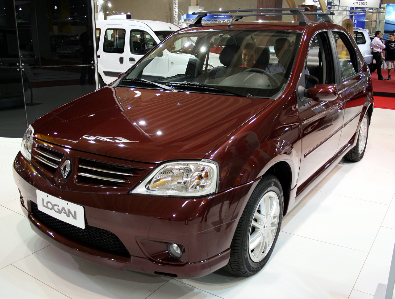 Renault Logan, made in São José dos Pinhais-PR, Brazil.